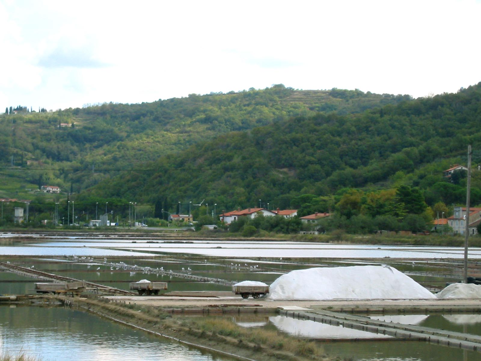 Soline v Sečovljah, Slovenia photo:Ziga 09:31, 16 April 2007 (UTC)